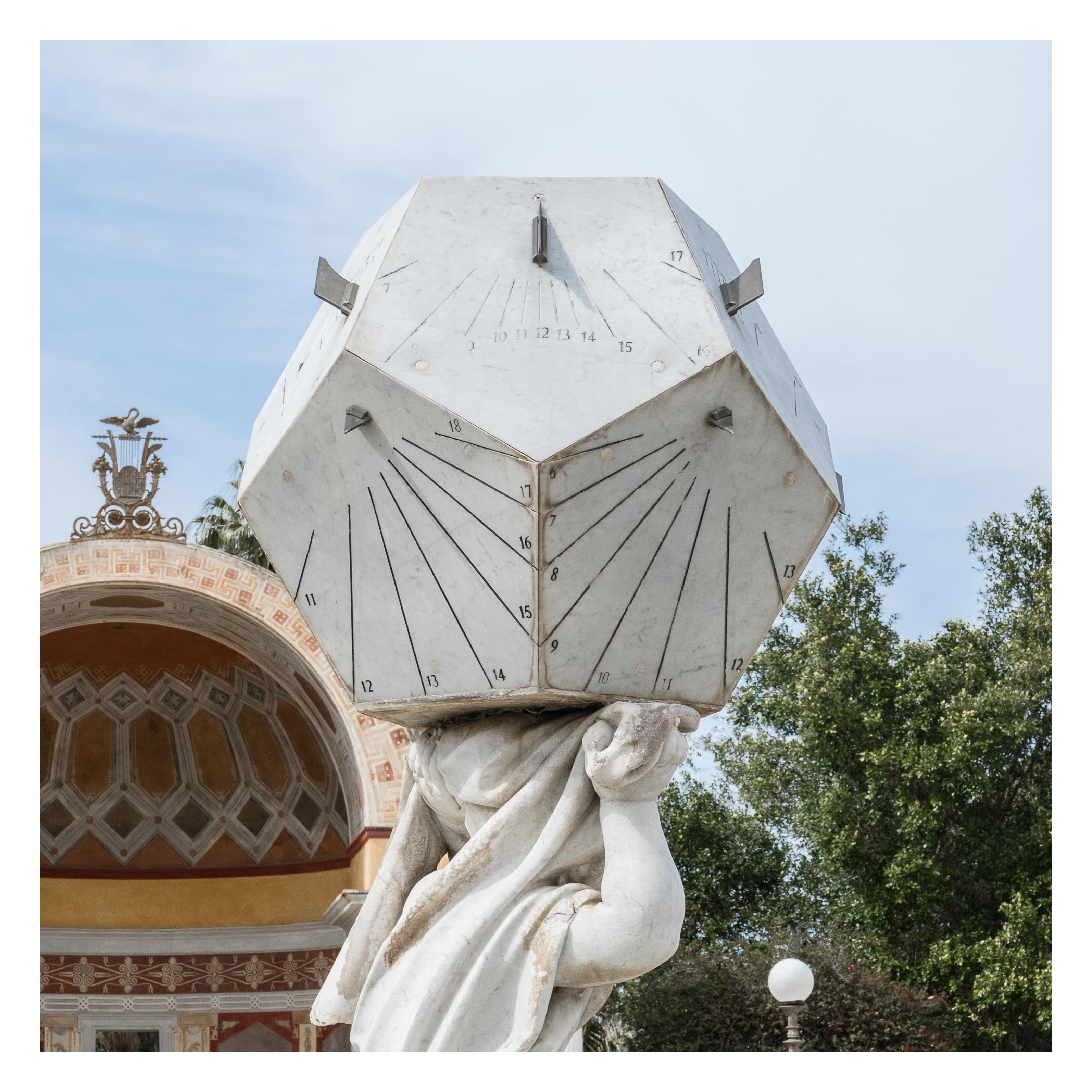 La statua di Atlante regge un dodecaedro con dodici orologi solari.